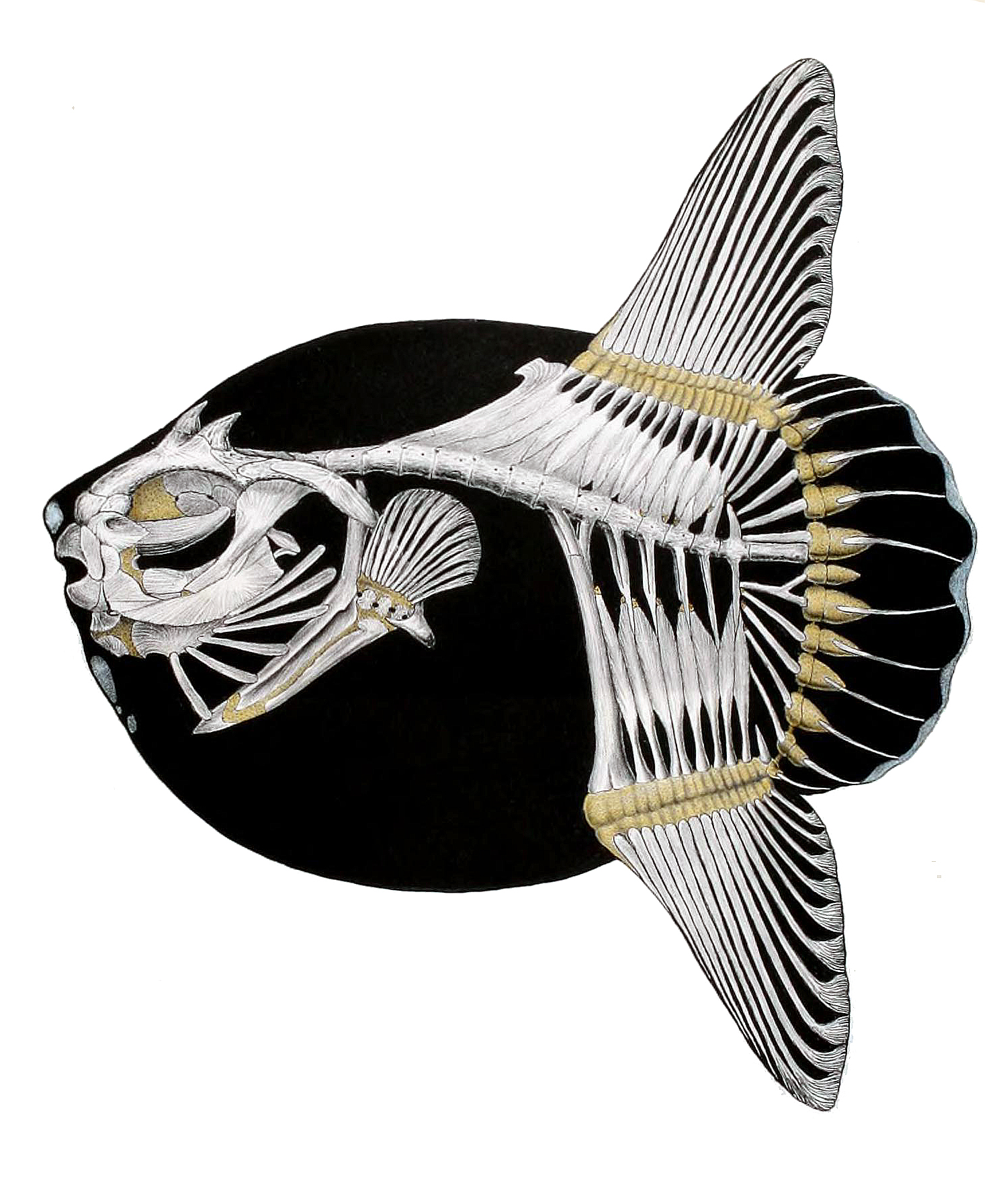 Mola mola skeleton